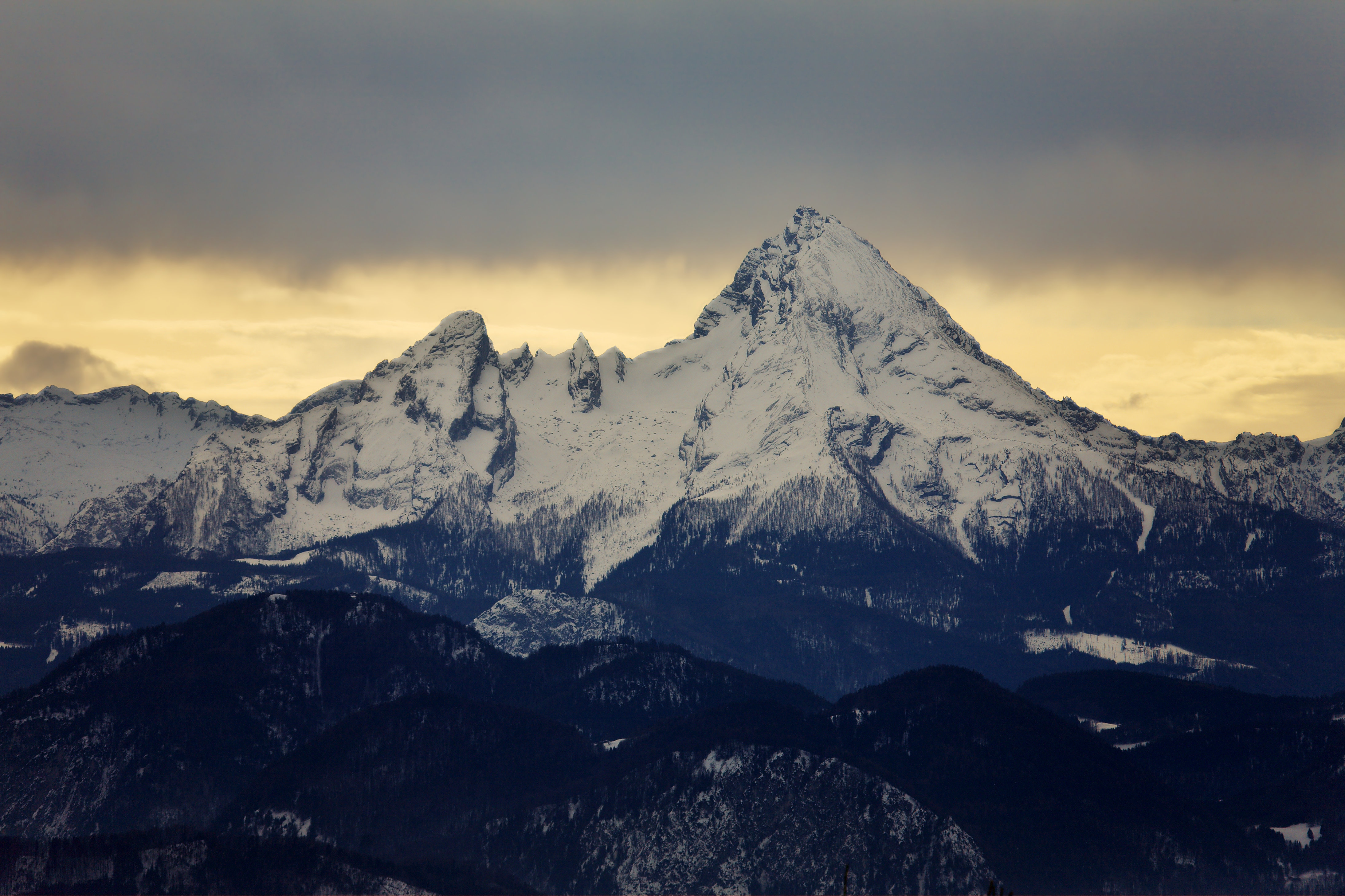 Watzmann seen from Gaisberg (Salzburg)